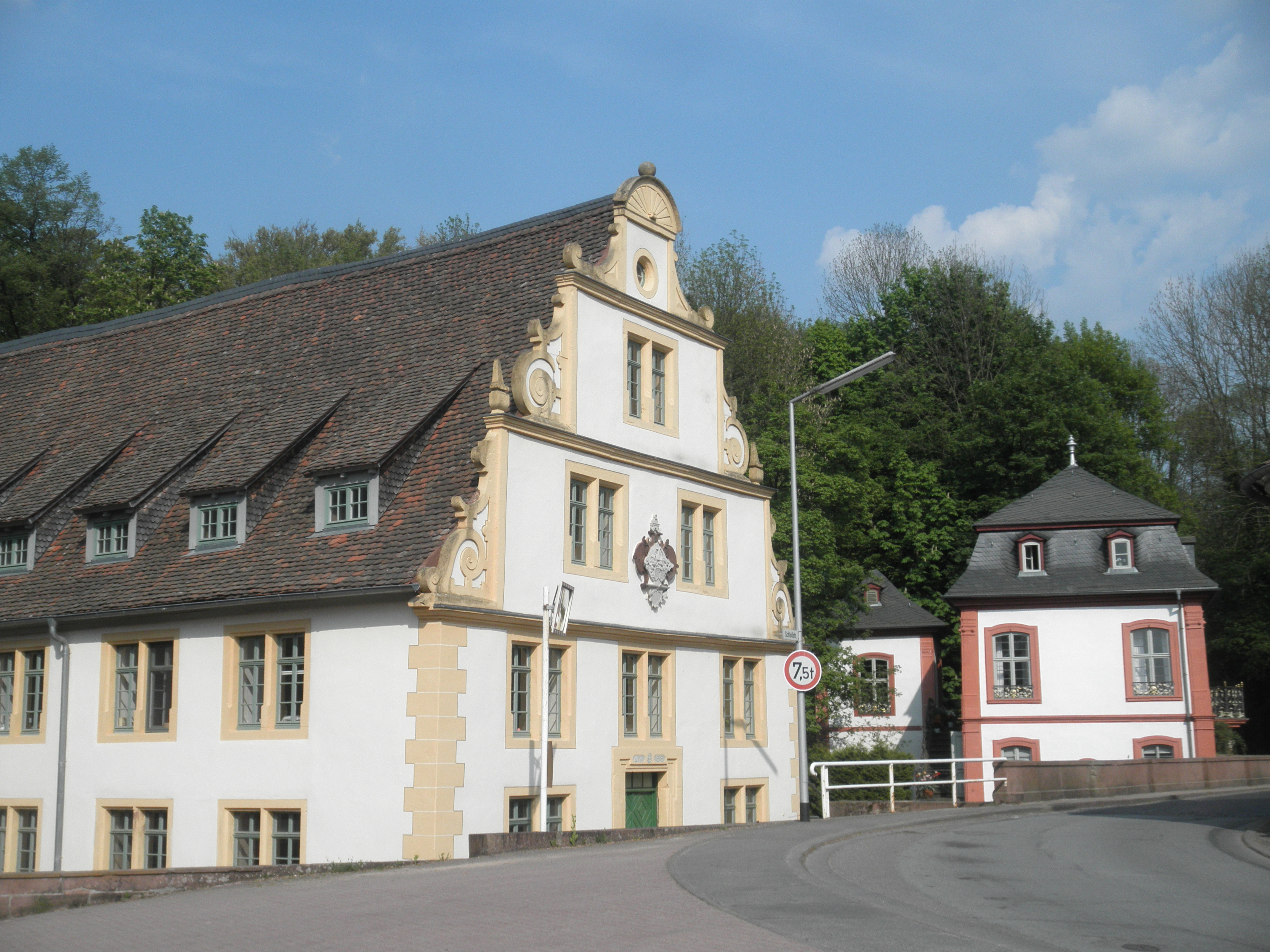 Laufwasserkraftwerk (akva energiejo) kaj Kavaliershaus (kavalira domo) de kastelo Fürstenau en Michelstadt